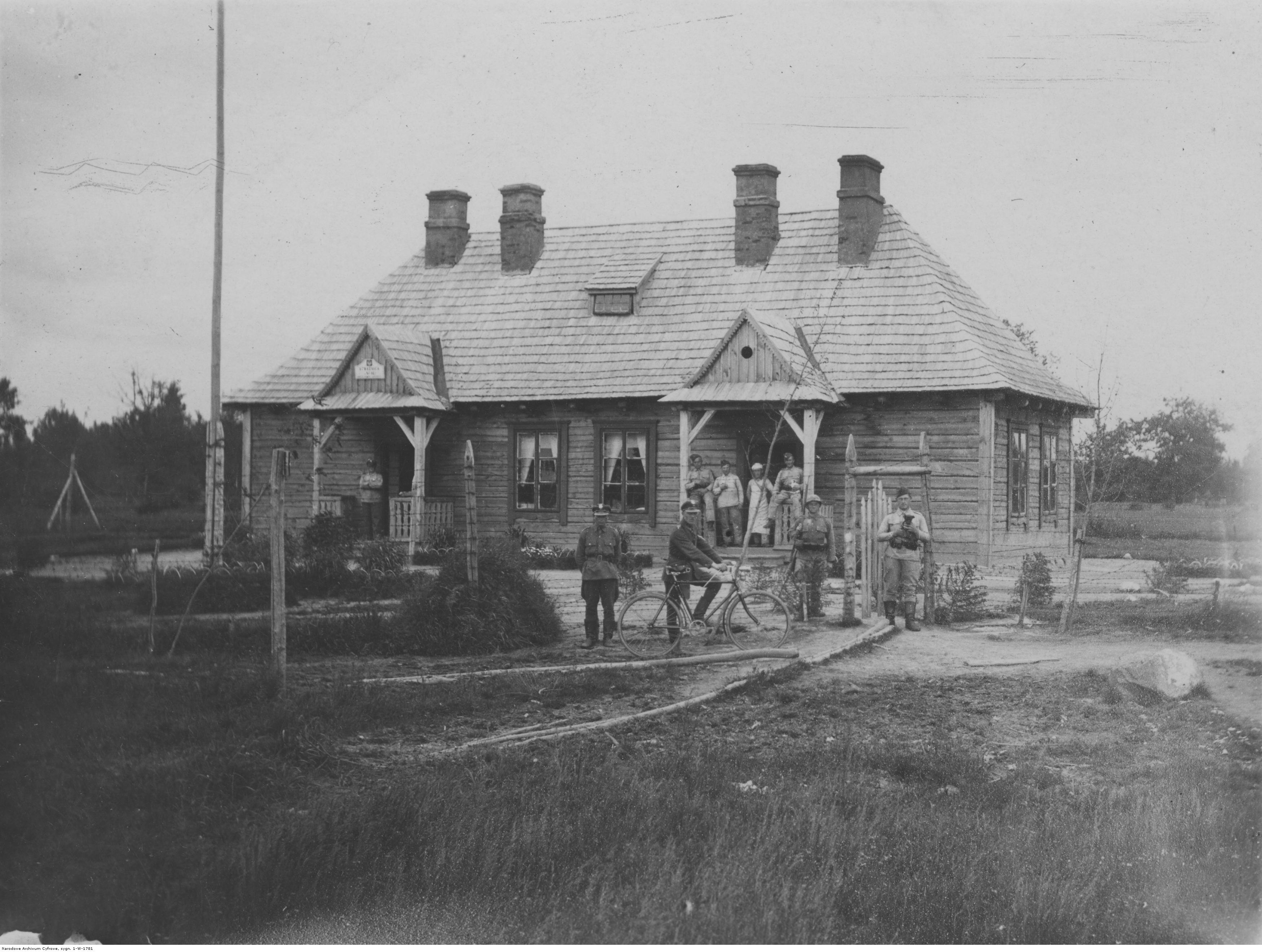 Strażnica Małe Stelmachowo 2 Kompanii 7 Batalionu Korpusu Ochrony Pogranicza. Koncern Ilustrowany Kurier Codzienny - Archiwum Ilustracji. Sygnatura: 1-W-1781